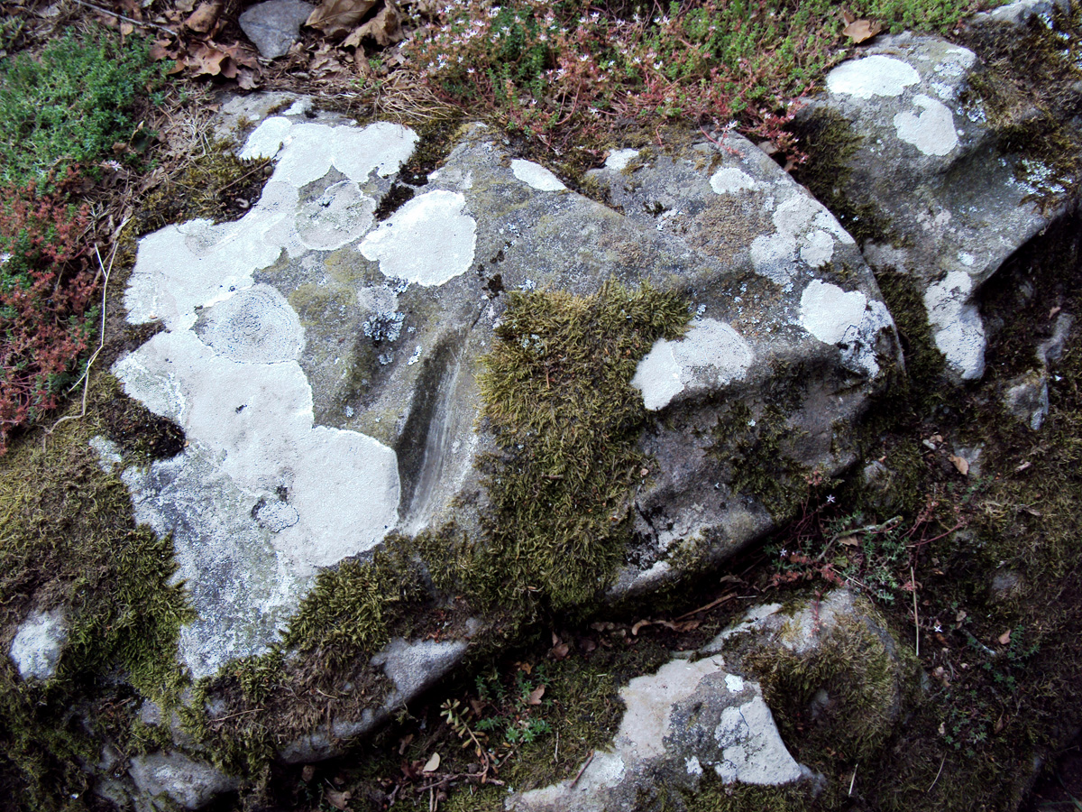 Le site de Quelfennec à Plussulien - Carrière de pierre néolithique - Côte d'Armor (22) - Les traces laissées par le polissage des pierres de dolérite lors du façonnage des hâches de pierre - Juillet 2011 - Photo 05 Ænglisc: The site Quelfennec near Plussulien - Neolithic stone quarry - Côte d'Armor (22) - The remnant traces left by the polishing stones of dolerite in the shaping of stone axes by the Neolithic men - July 2011 - Photo 05